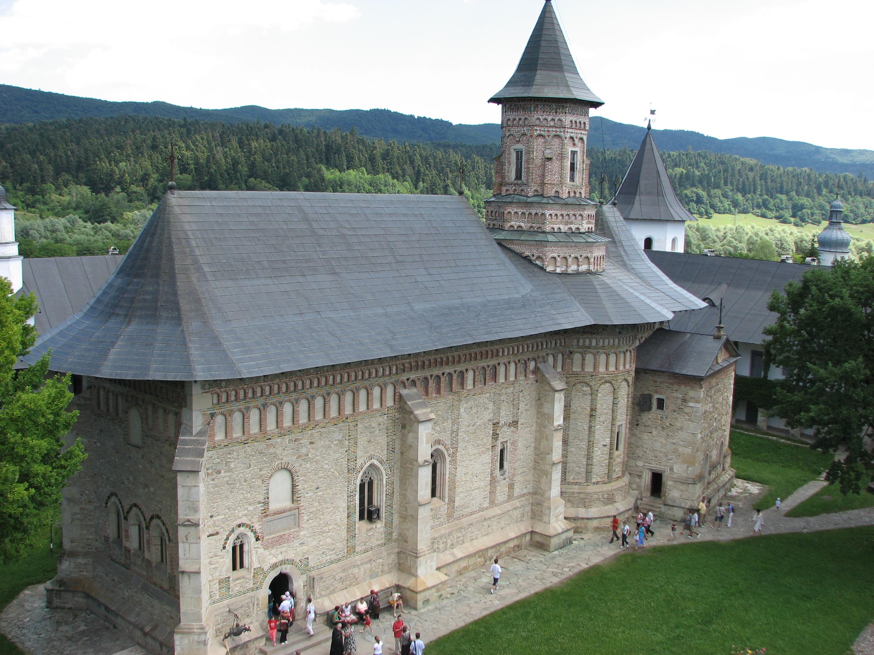 Biserica Mănăstirii Neamţ